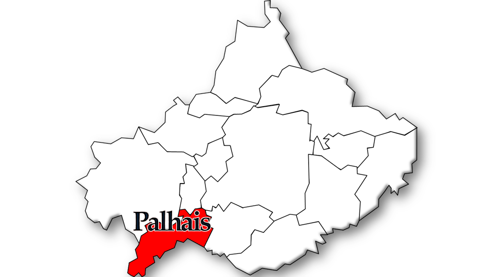 População